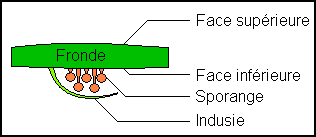 Schéma représentant l'indusie protégeant les sporanges chez les Ptéridophytes.